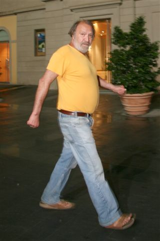 Carlo Monni during a show in Campi Bisenzio, Teatro Dante